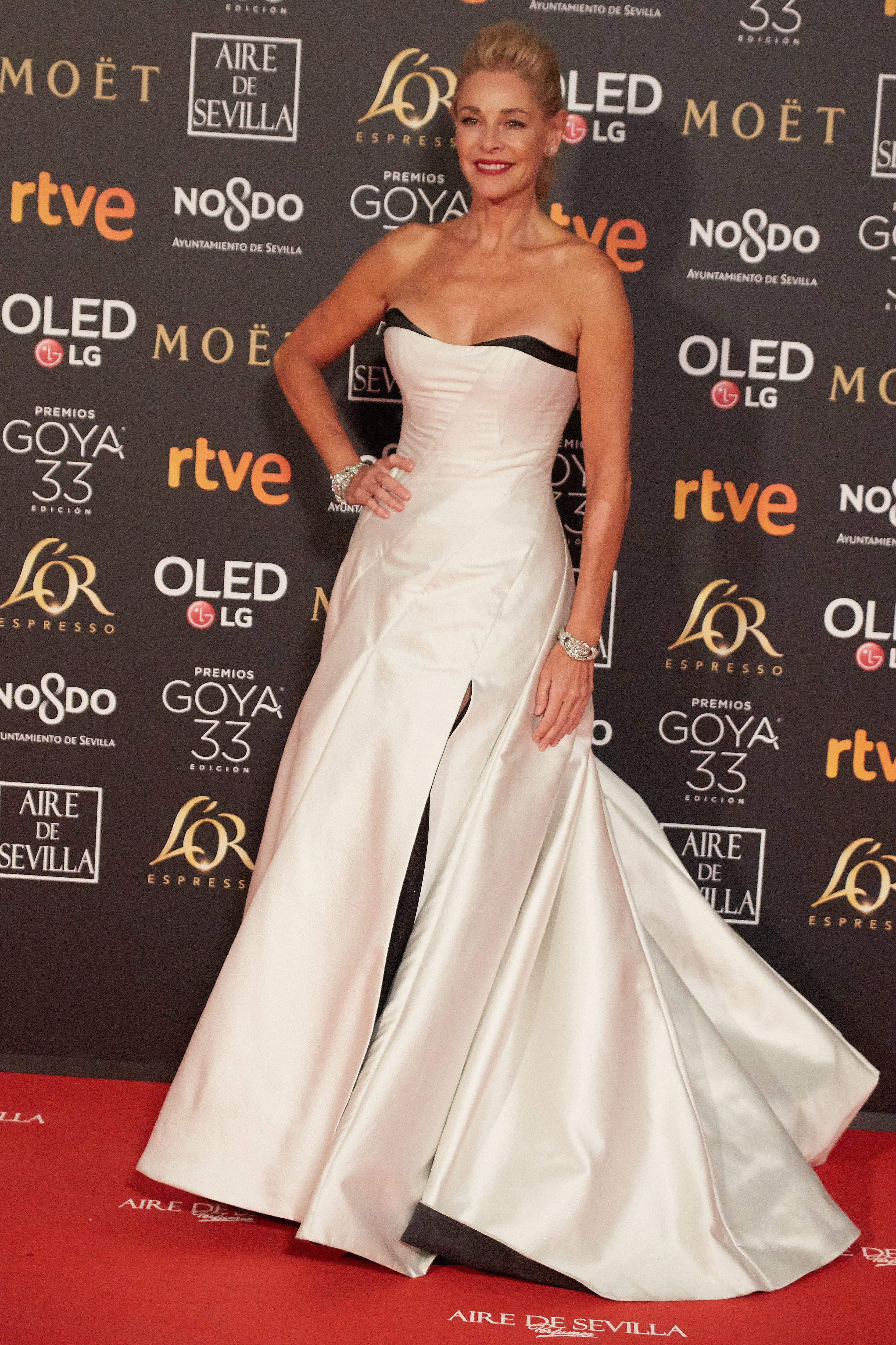 Belen Rueda en la alfombra roja de los Premios Goya celebrados en Sevilla en Febrero 2019